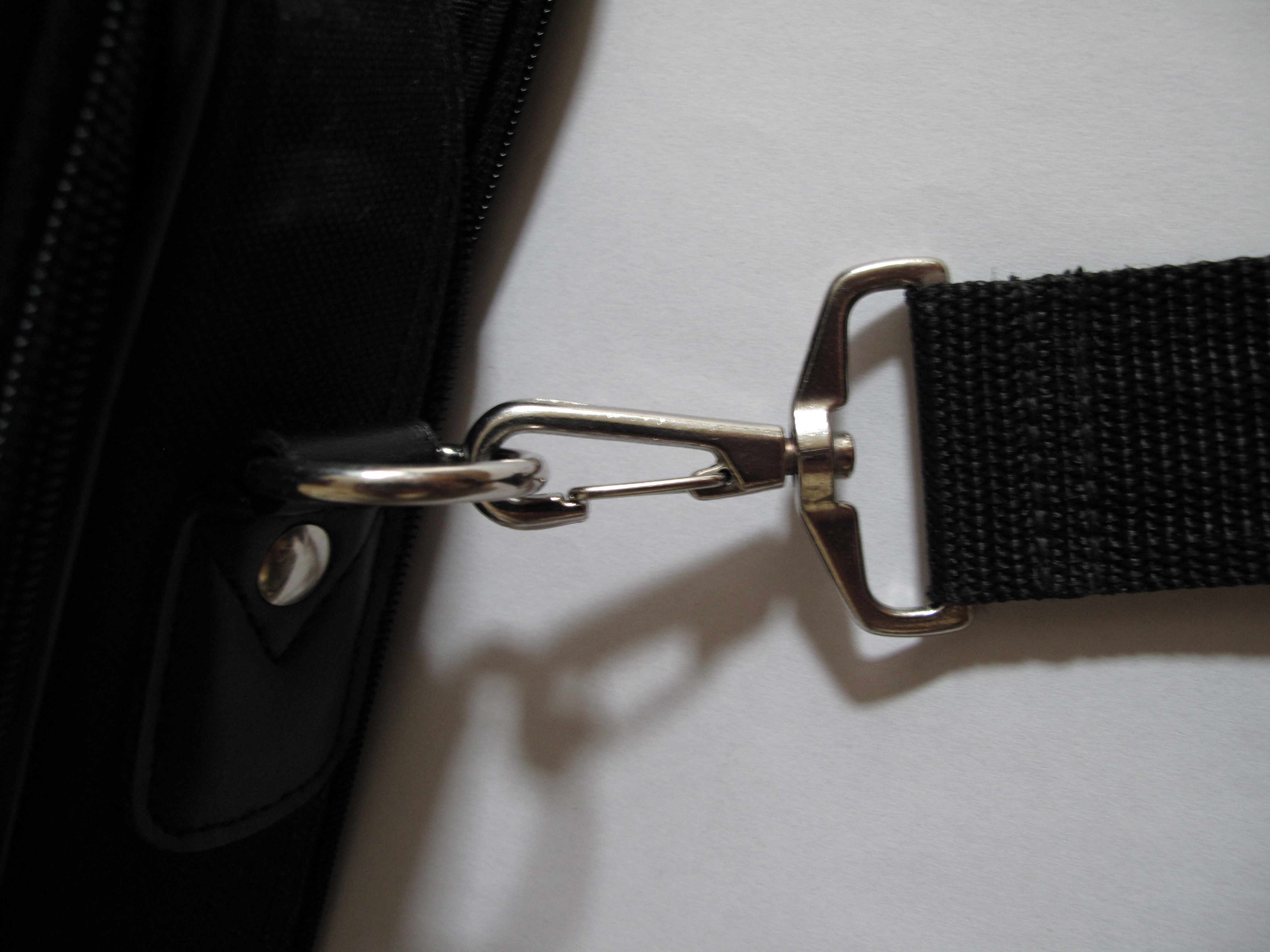 Je to klips? Jak se to jmenuje anglicky?